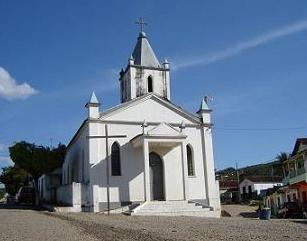 Palmopolis